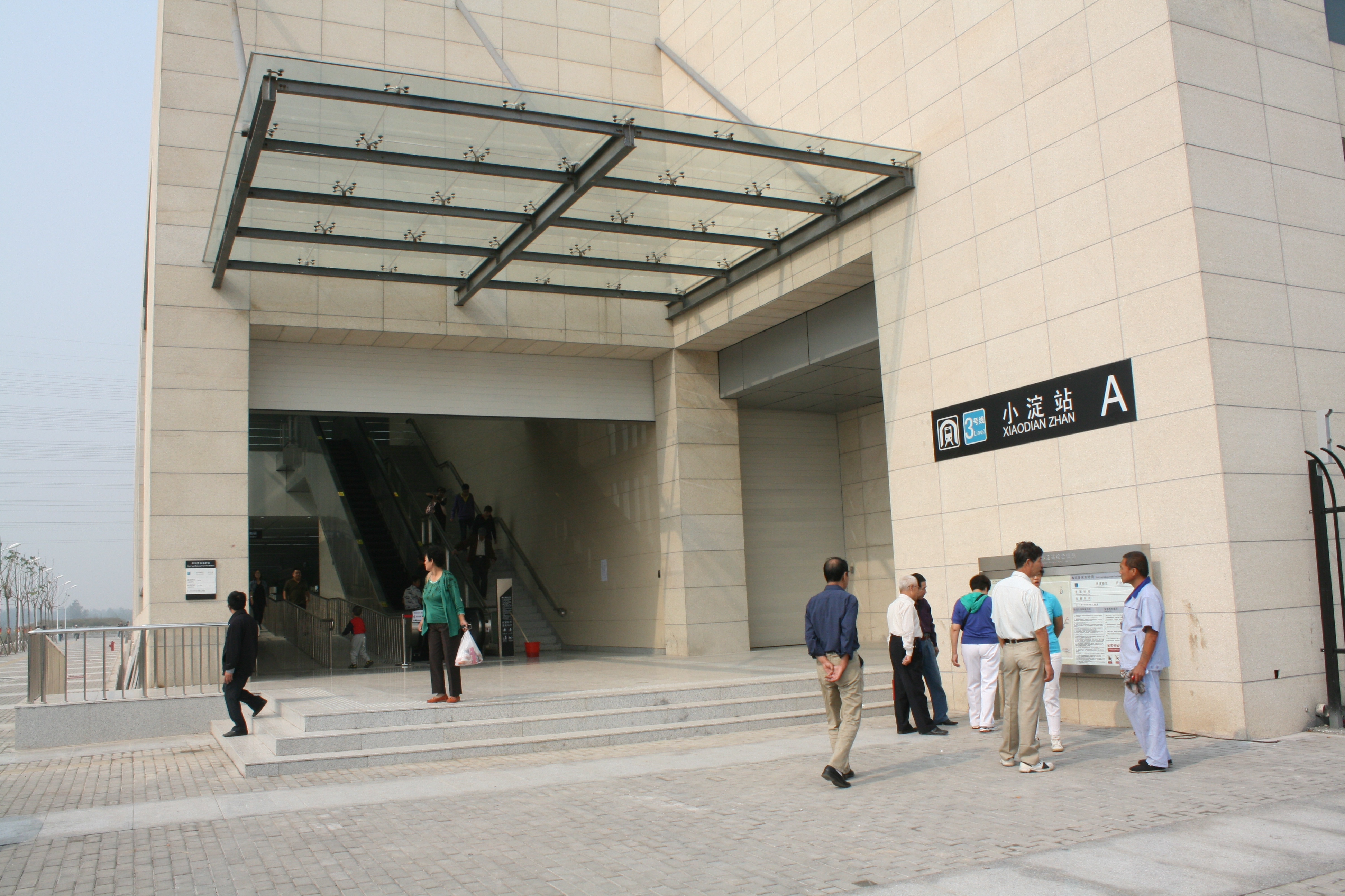 天津地鐵三號線小淀站A口 0001